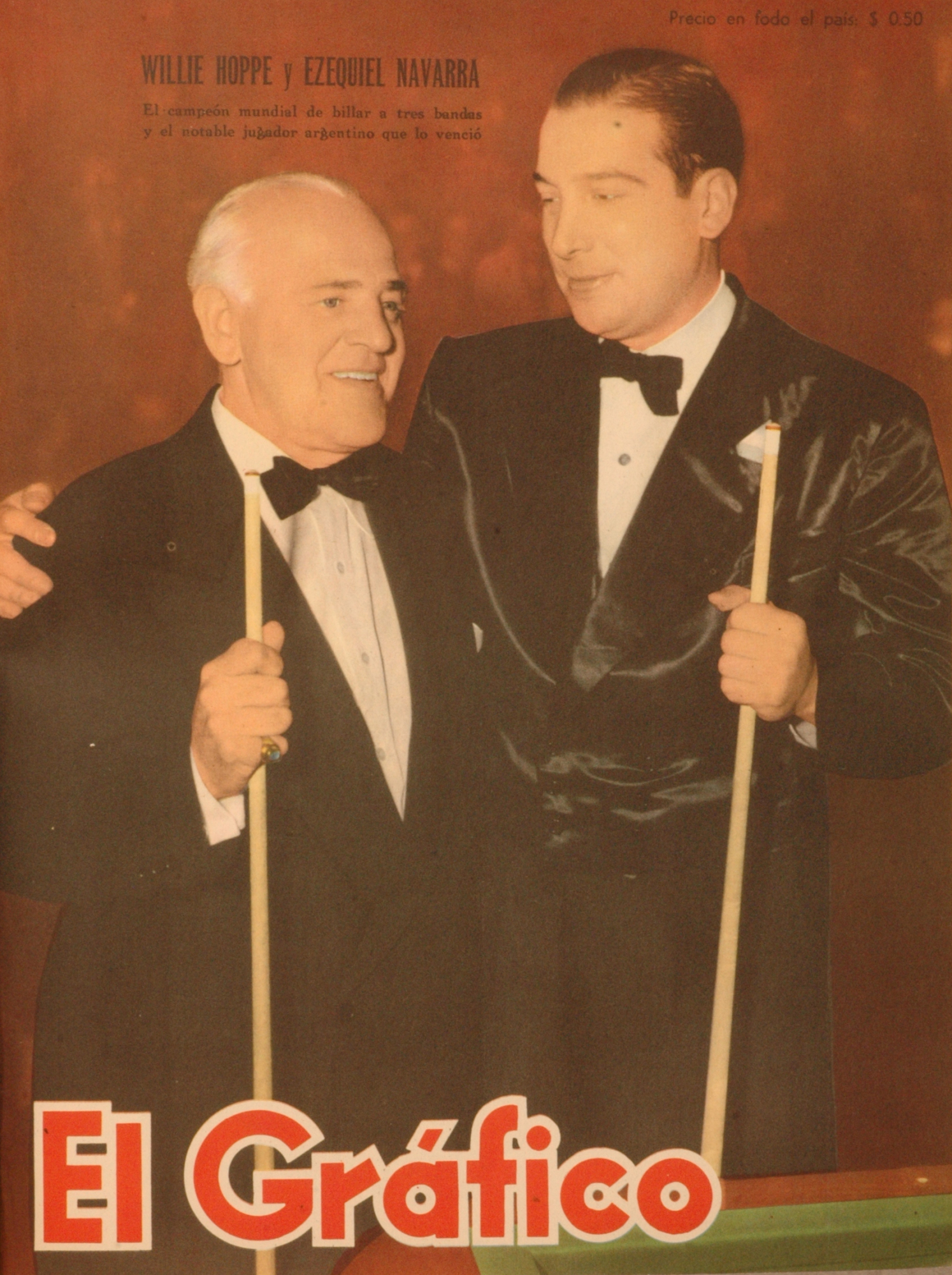 El Grafico del 29 de Julio de 1949. Edicion 1564